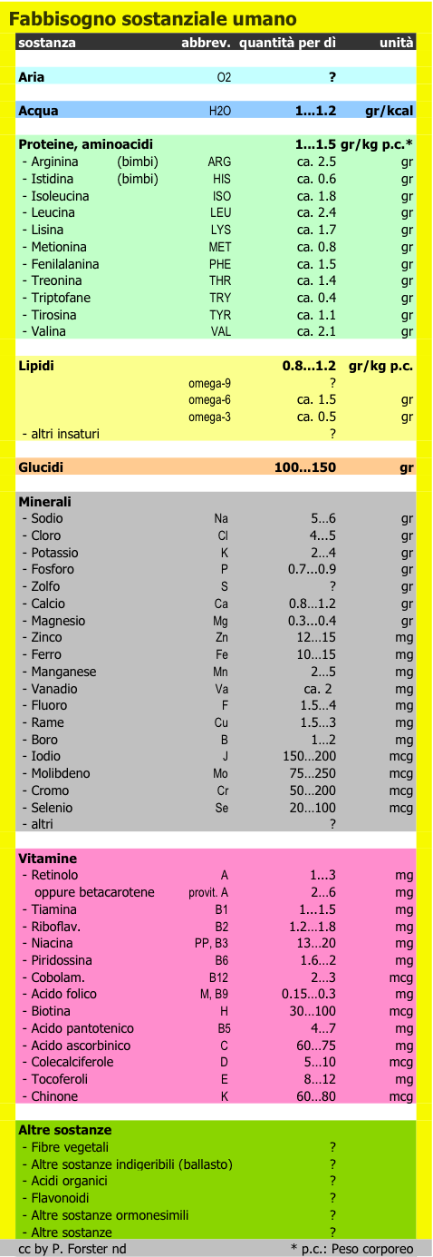 Grafica: Medicina: Fisiologia: Fabbisogno, alimentare, sostanziale, umano, aria, acqua, proteine, aminoacidi, lipidi, glucidi, minerali, oligoelementi, vitamine, altre sostanze, medicina popolare, complementare, laica, non convenzionale